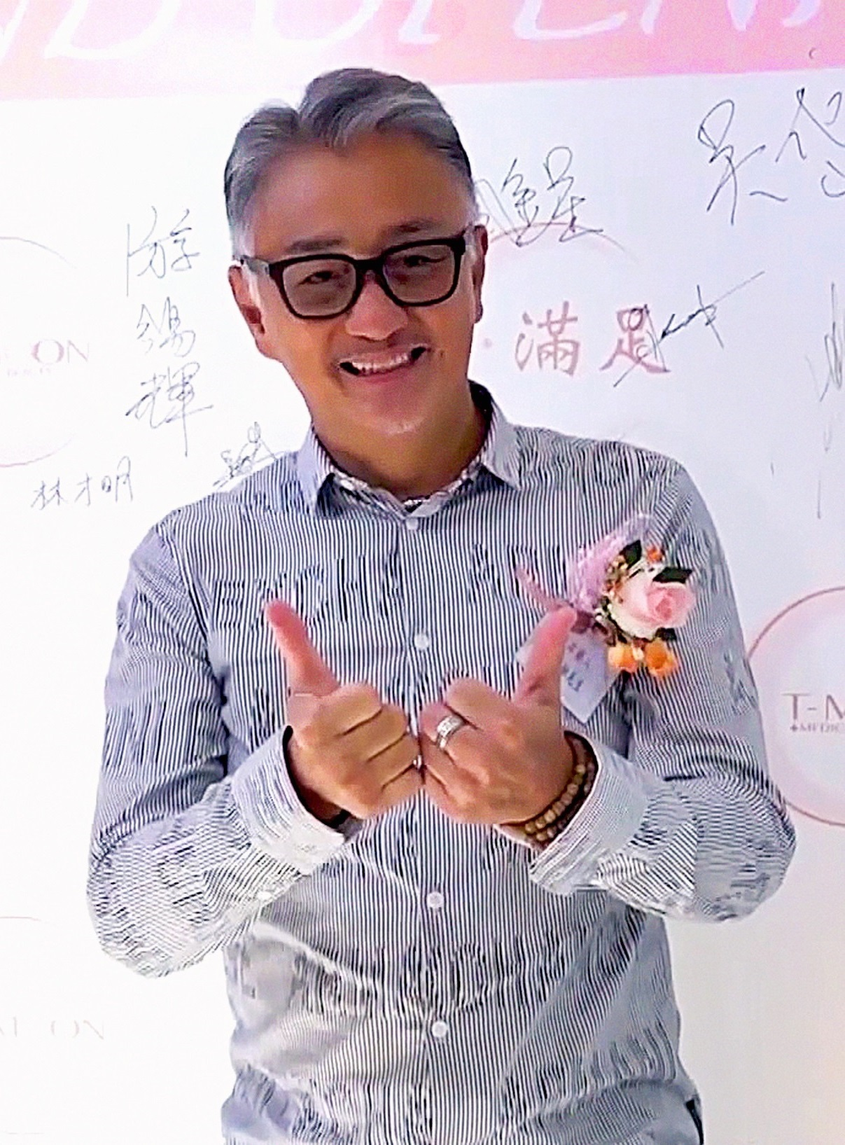 中文（香港）: 藏‧滿足按摩薰蒸養生館擴充開幕活動